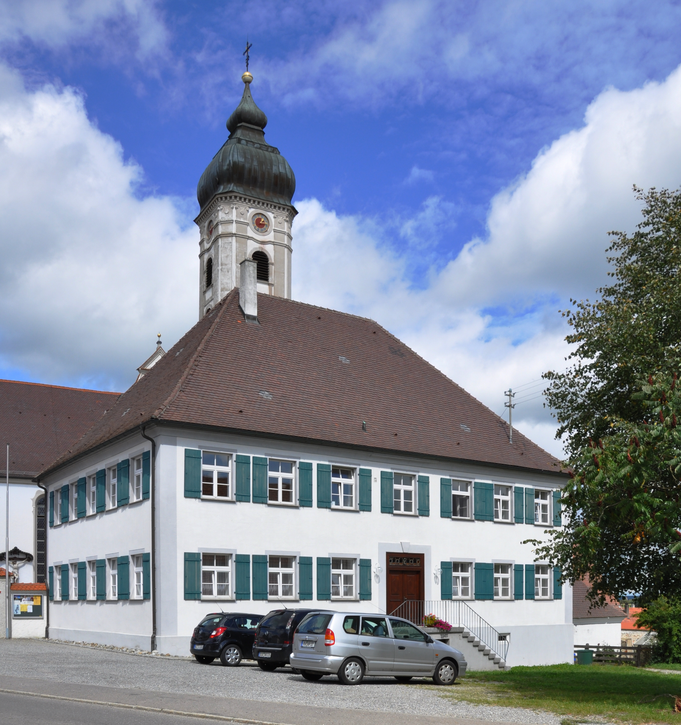 Hochdorf (Riß), Ortsteil Unteressendorf, Pfarrhof